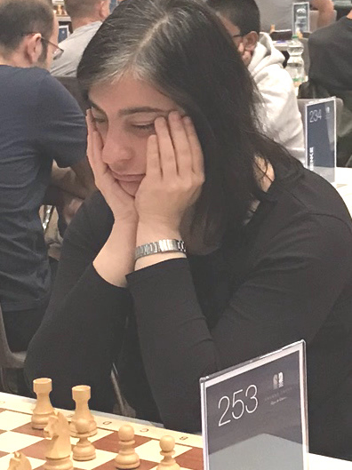 Patricia Llaneza Vega, Runde 8 der Grenke Chess Open 2019 in Karlsruhe.